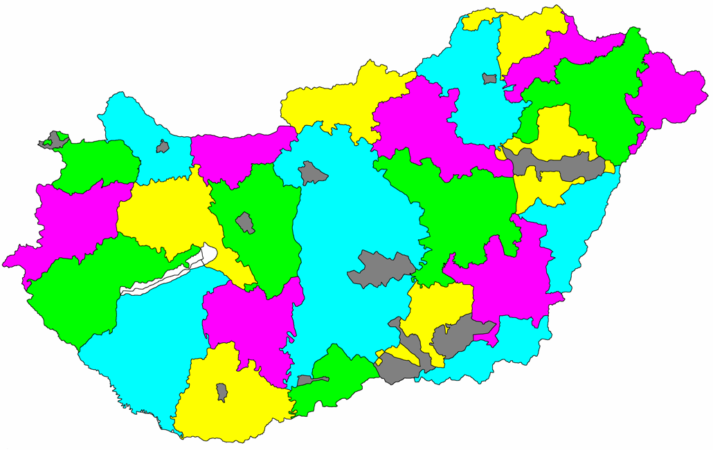 Magyarország vármegyéi 1929-ben